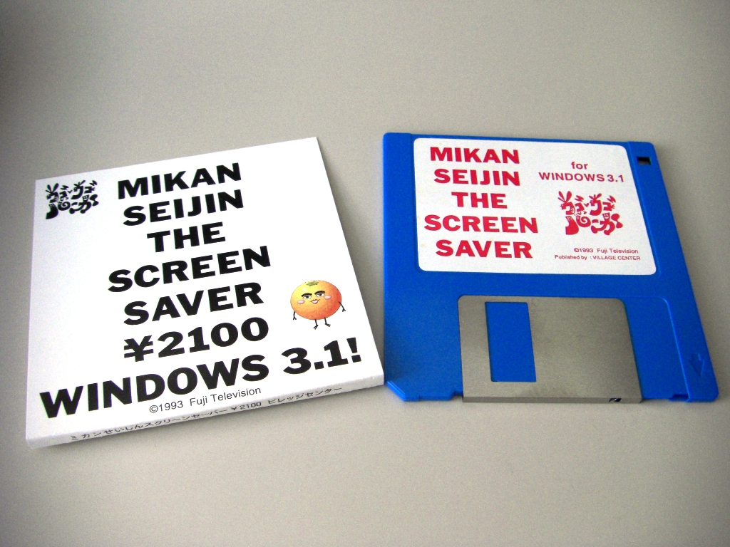 ミカンせいじんスクリーンセーバー2100円のメディアを投稿者が撮影したもの。